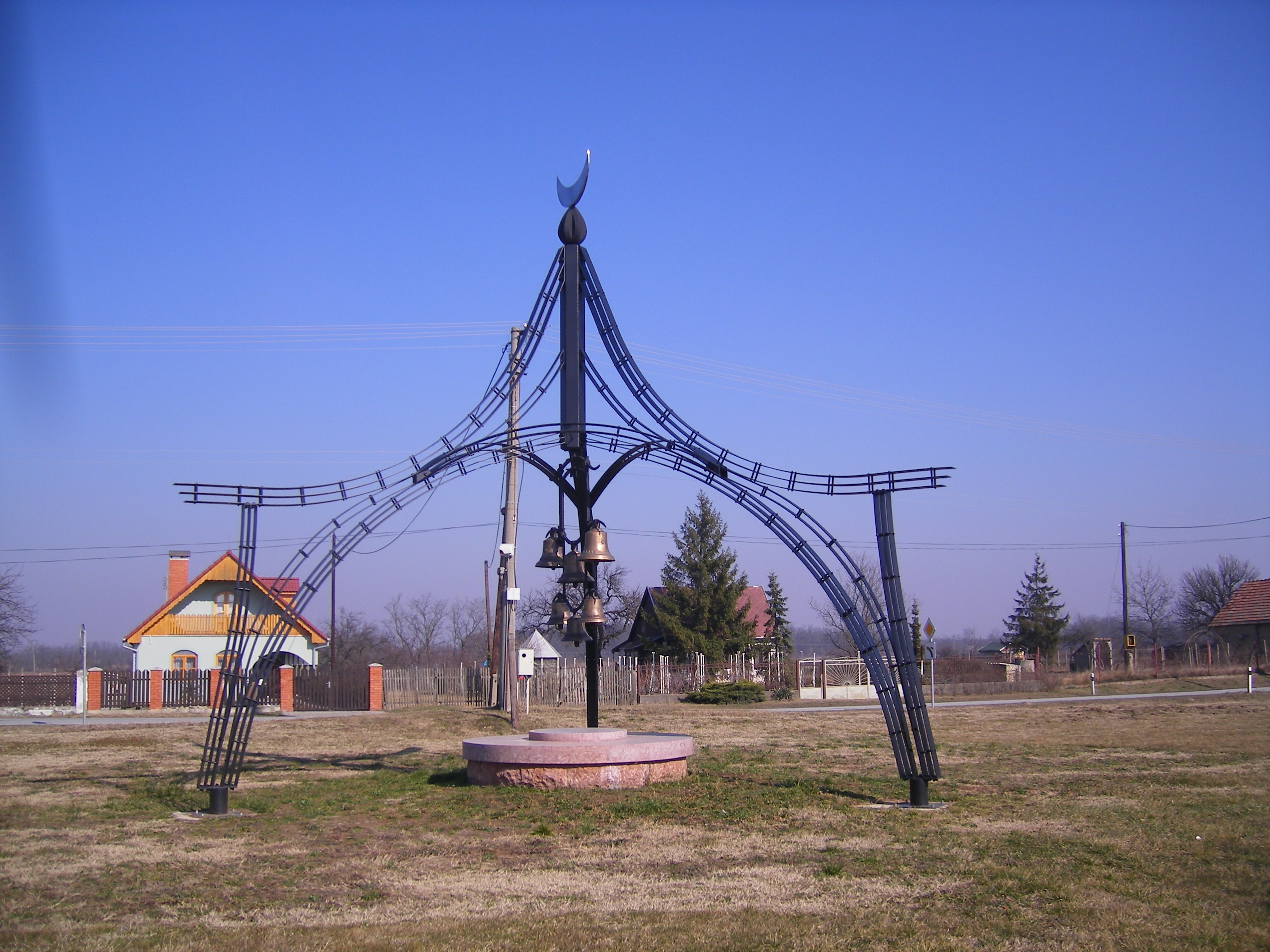 Zsitvatő - a zsitvatoroki béke emlékműve